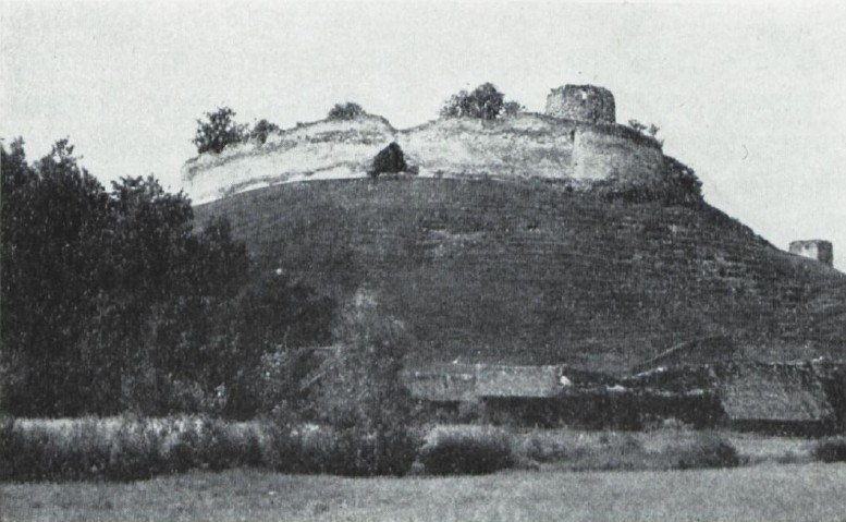 Irboska kantsivaremed